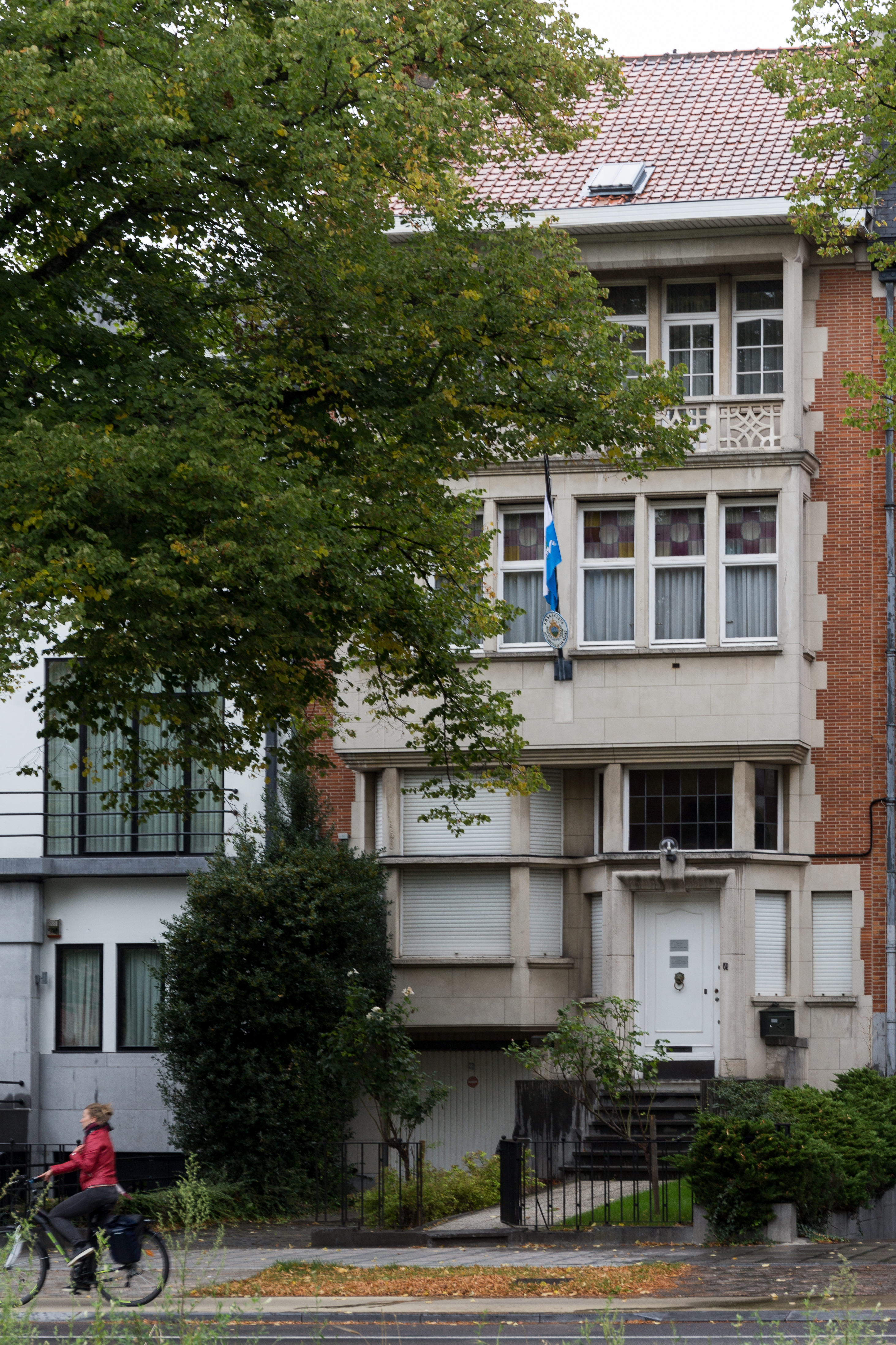 Ambassade de Saint-Marin en Belgique, avenue Franklin Roosevelt 62 à Bruxelles.